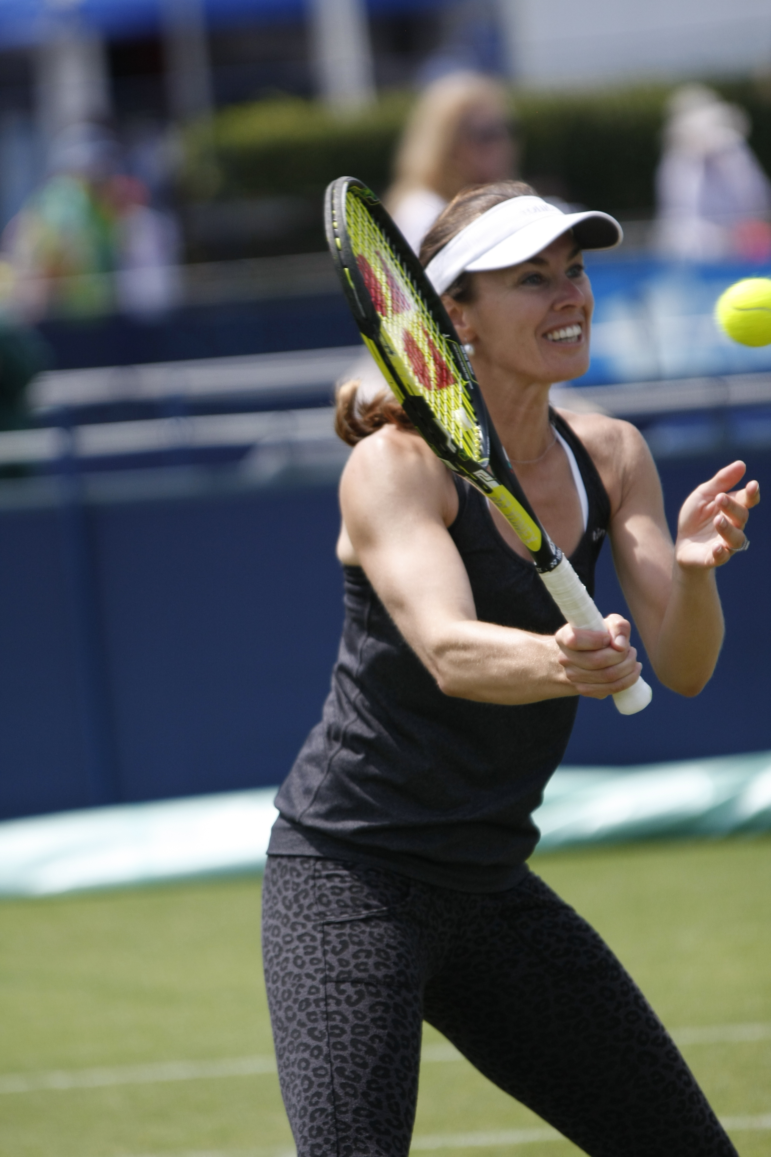 Martina Hingis